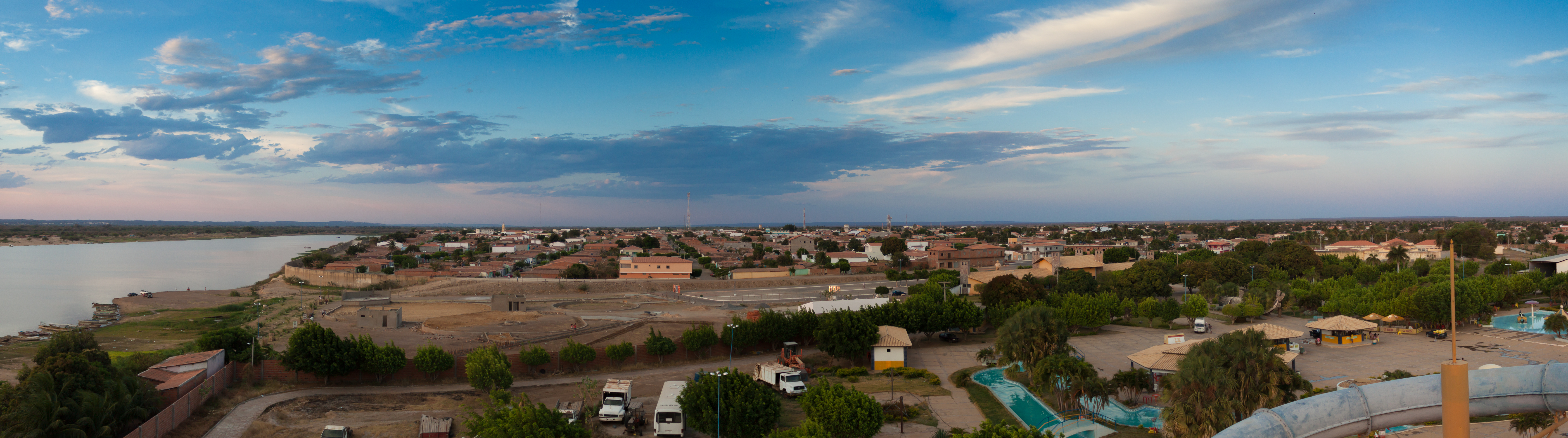 Rio São Francisco, Xique-Xique - Bahia